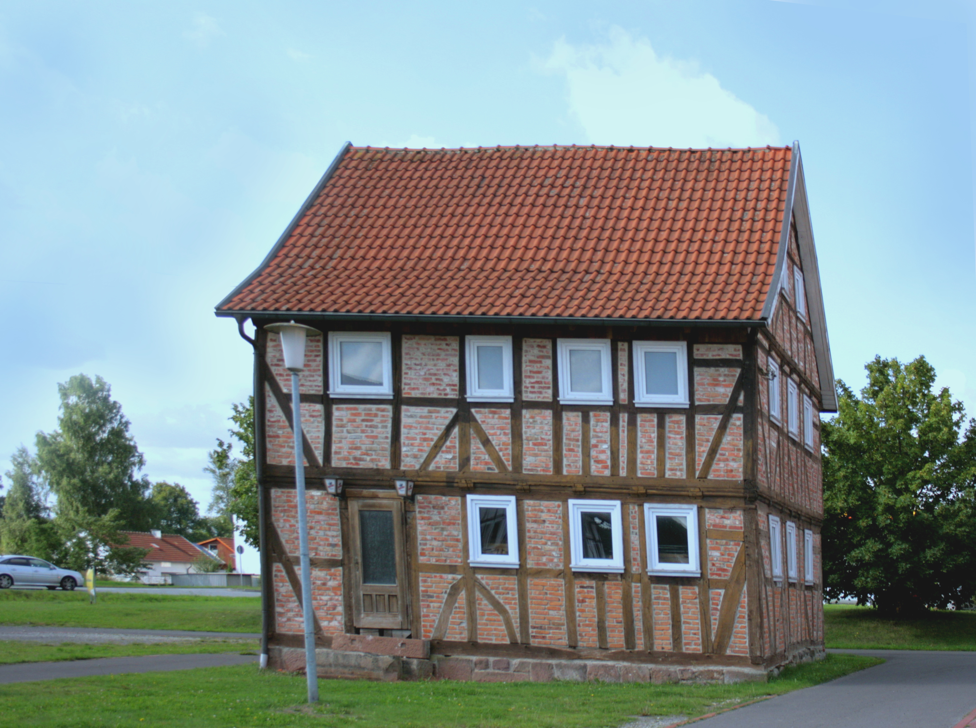 An der Straße „Auf dem Pfingstrasen“ in Breitenworbis (Eichsfeld)